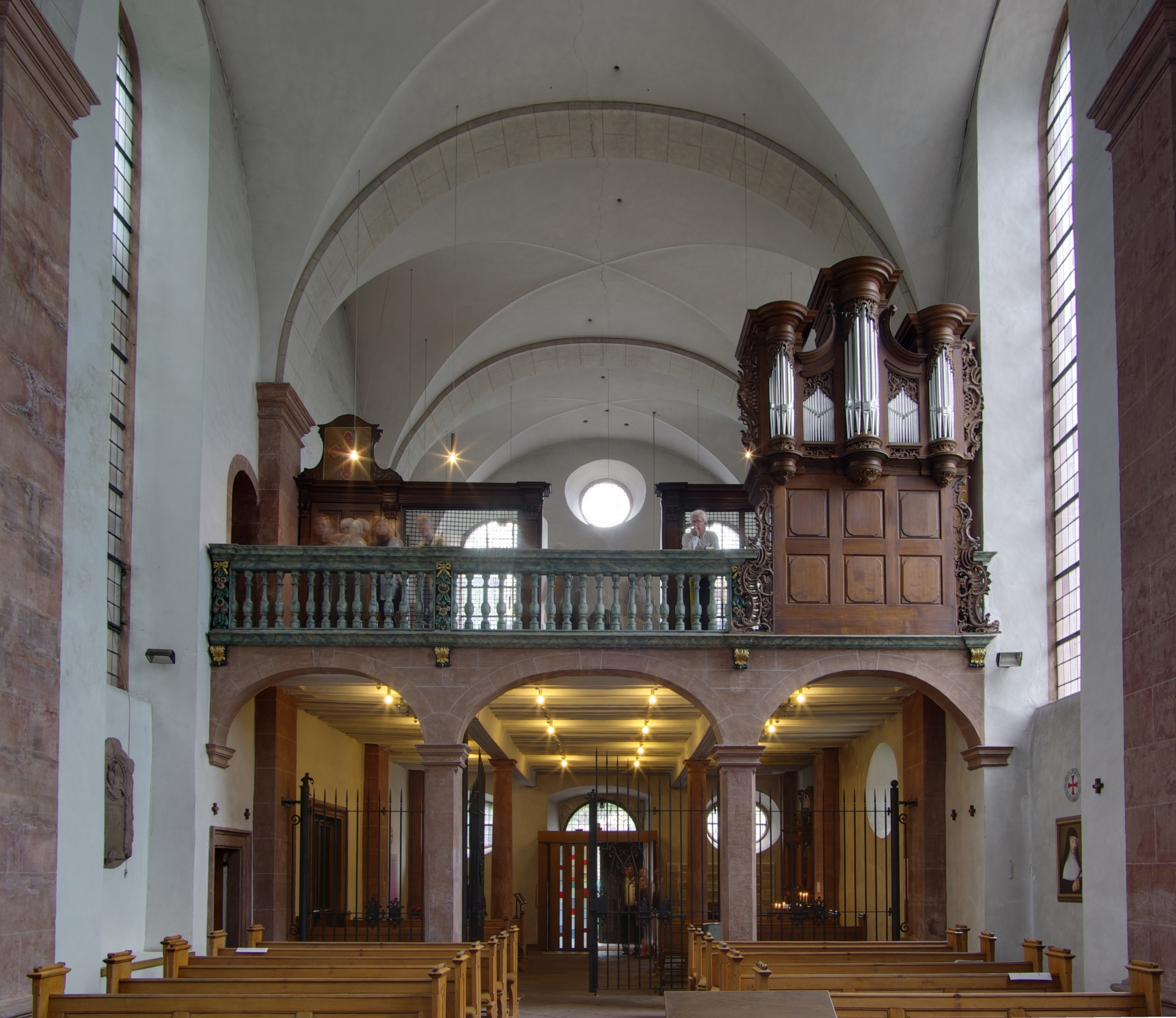 ehemalige Klosterkirche: hochbarocker Saalbau mit Dachreiter, 1714–36 (Weihe), Architekt Nicolaus Minden, Erneuerung um 1730, Architekt Frater Joseph Walter